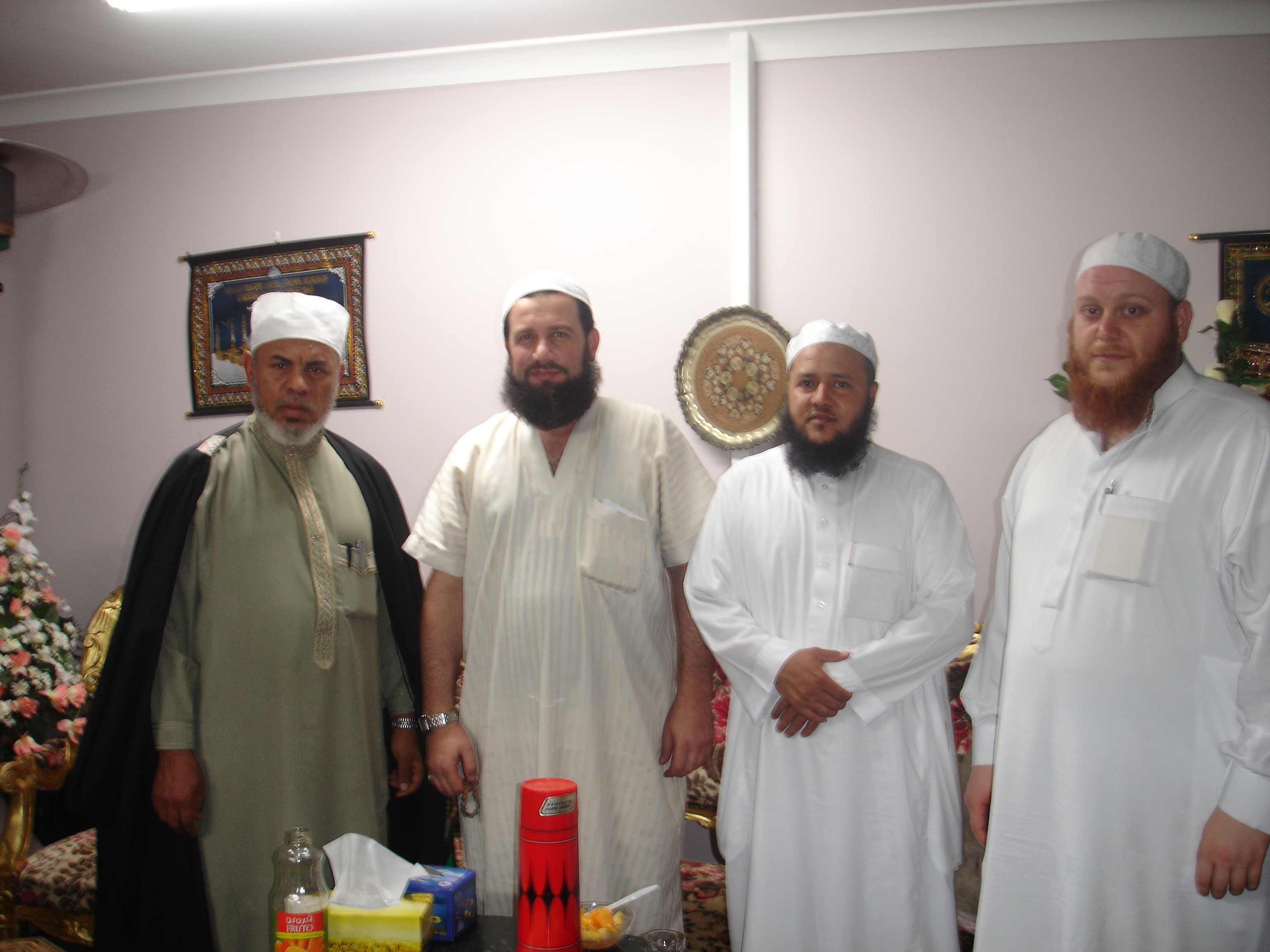 مناسبة ، اجتماع ، ، ضيافة